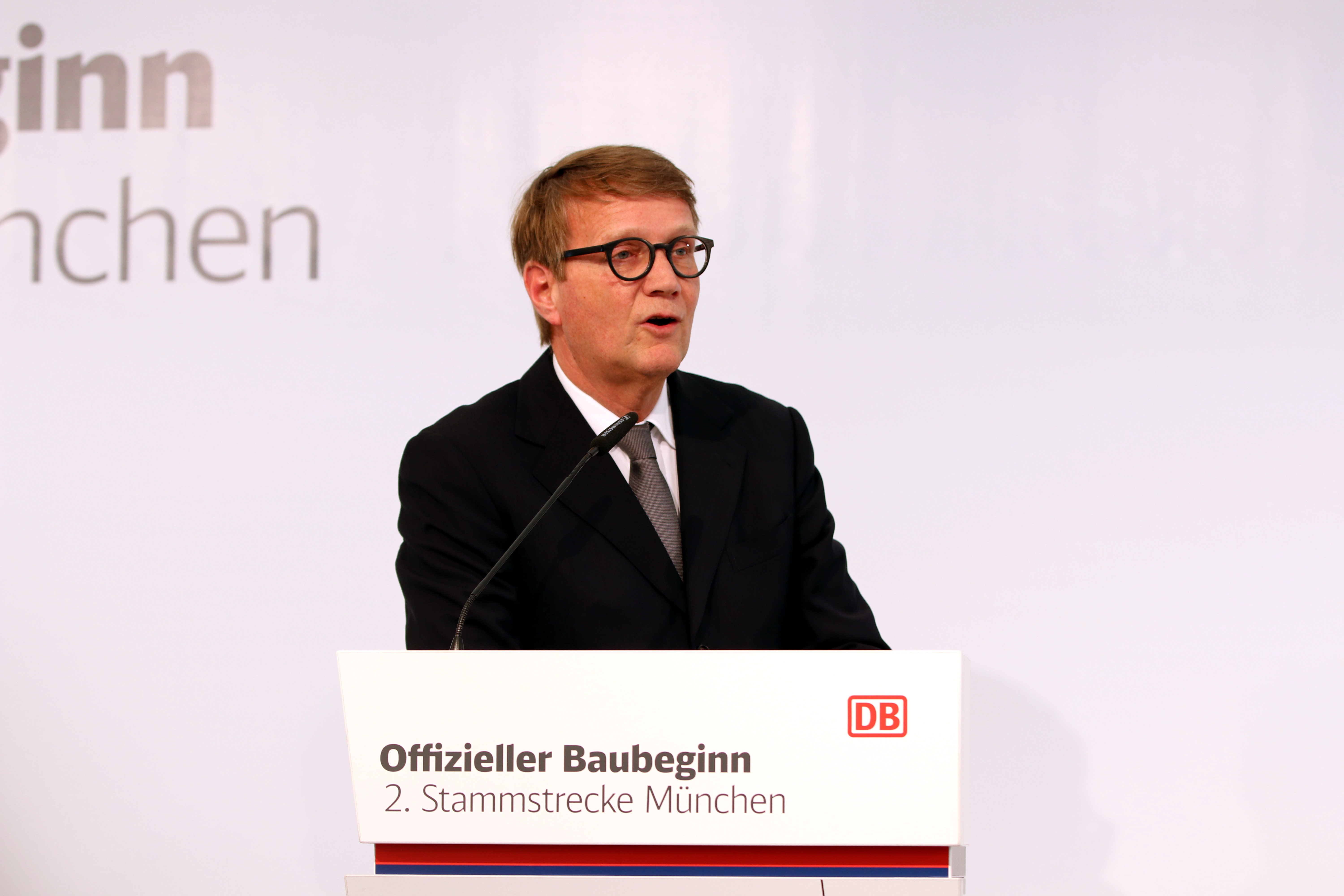 Ronald Pofalla, Infrastruktur-Vorstand der Deutschen Bahn AG beim 1. Spatenstich zur 2.-S-Bahn-Stammstrecke in München